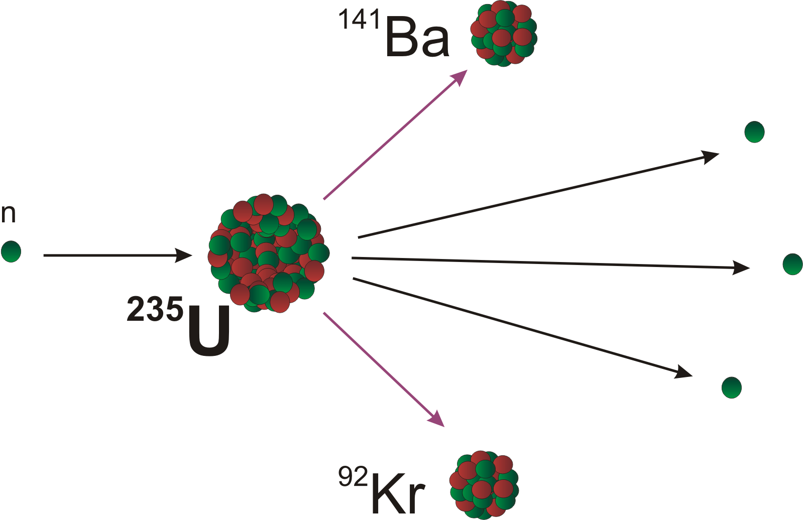 Fisión del U-235 en Ba y Kr